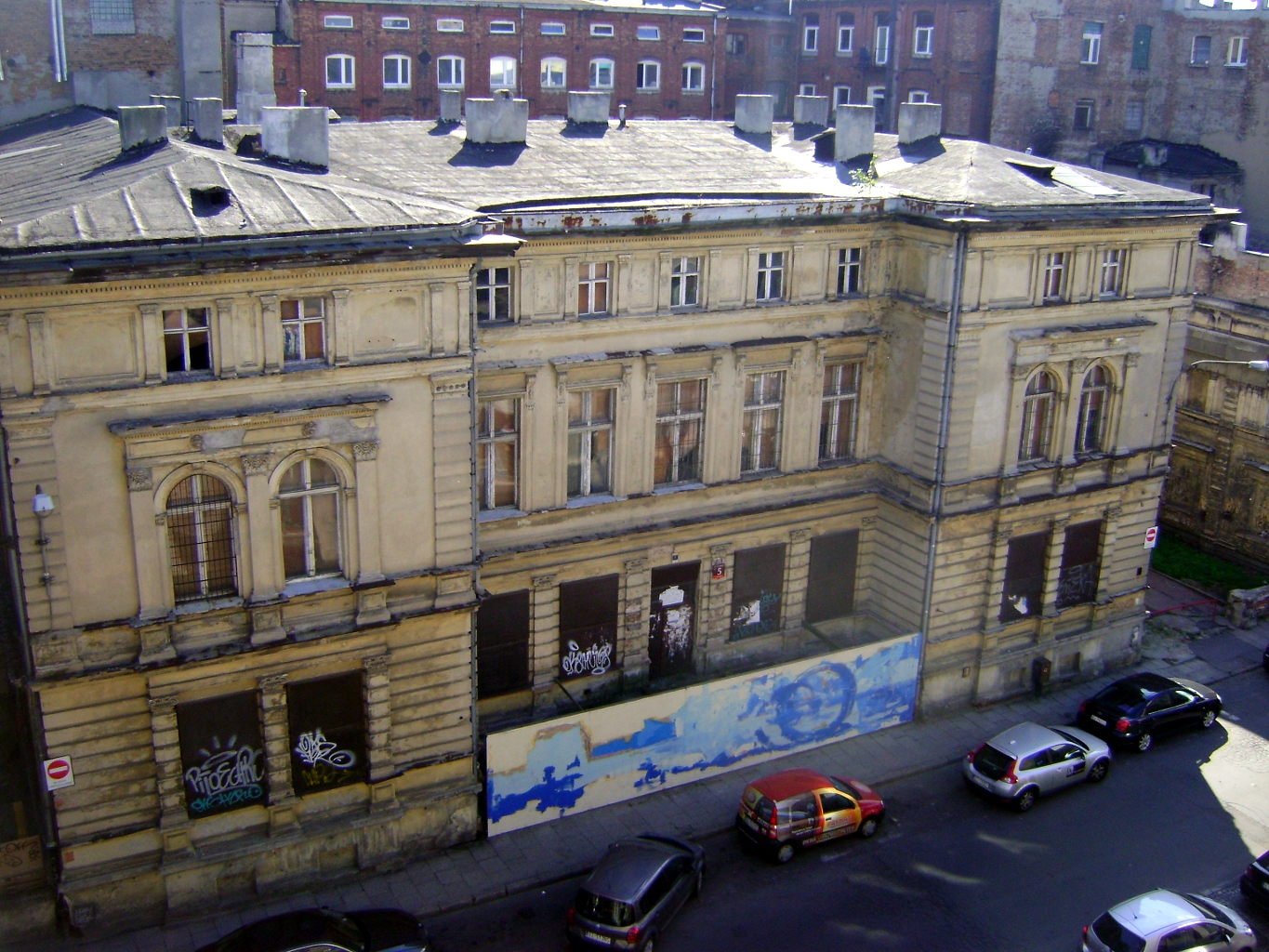 willa Moniuszki 5, Miasto Łódź